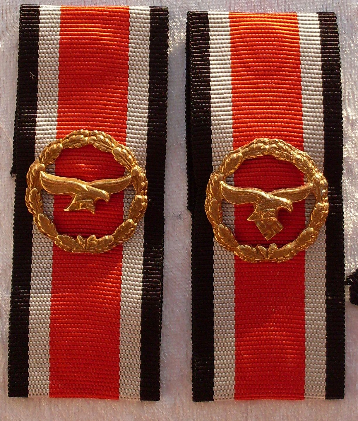 Ehrenblattspange der Luftwaffe (links 57er Version, rechts stiftungsmäßige Ausführung)